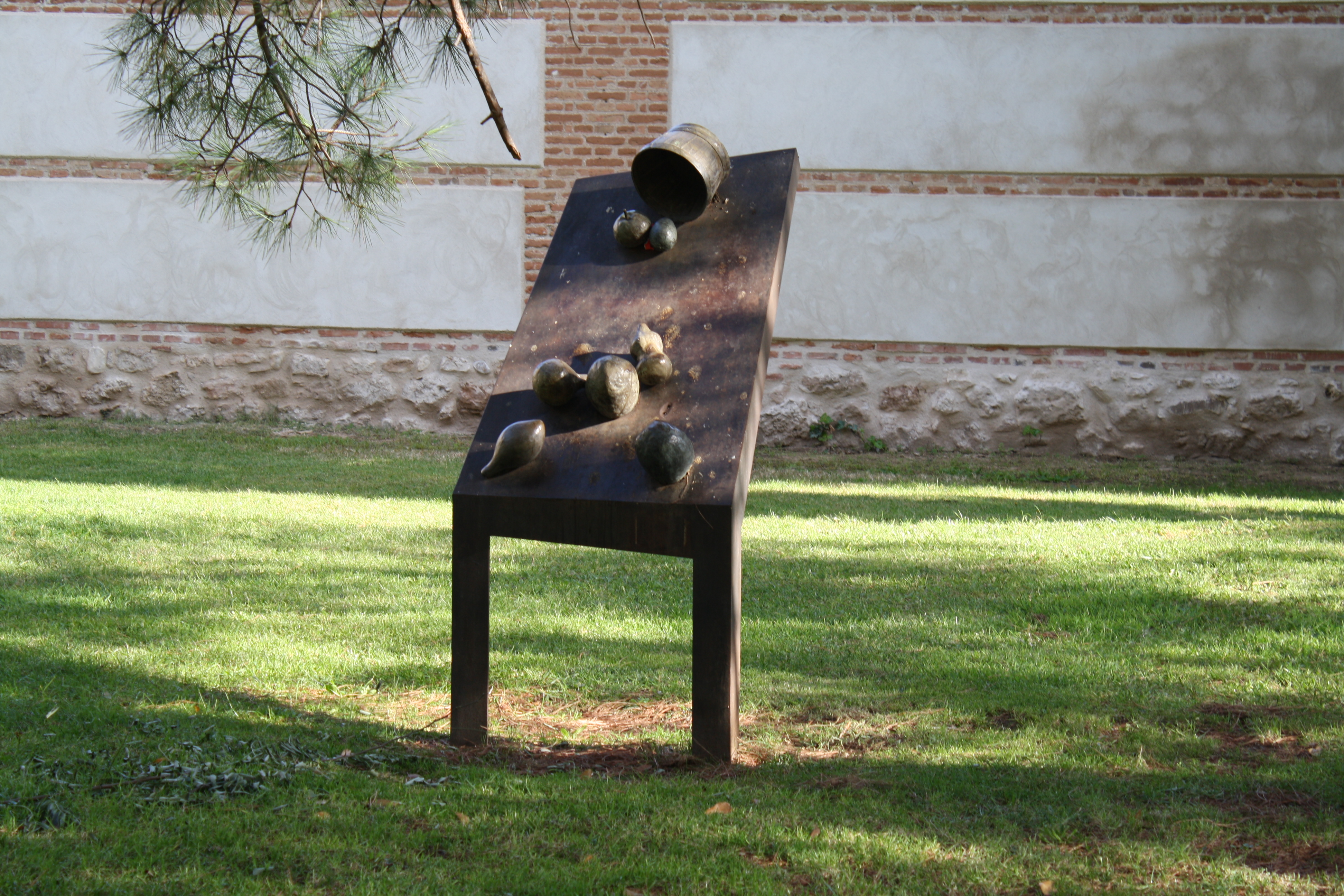 Museo de escultura al aire libre. Alcalá de Henares. Comunidad de Madrid. España